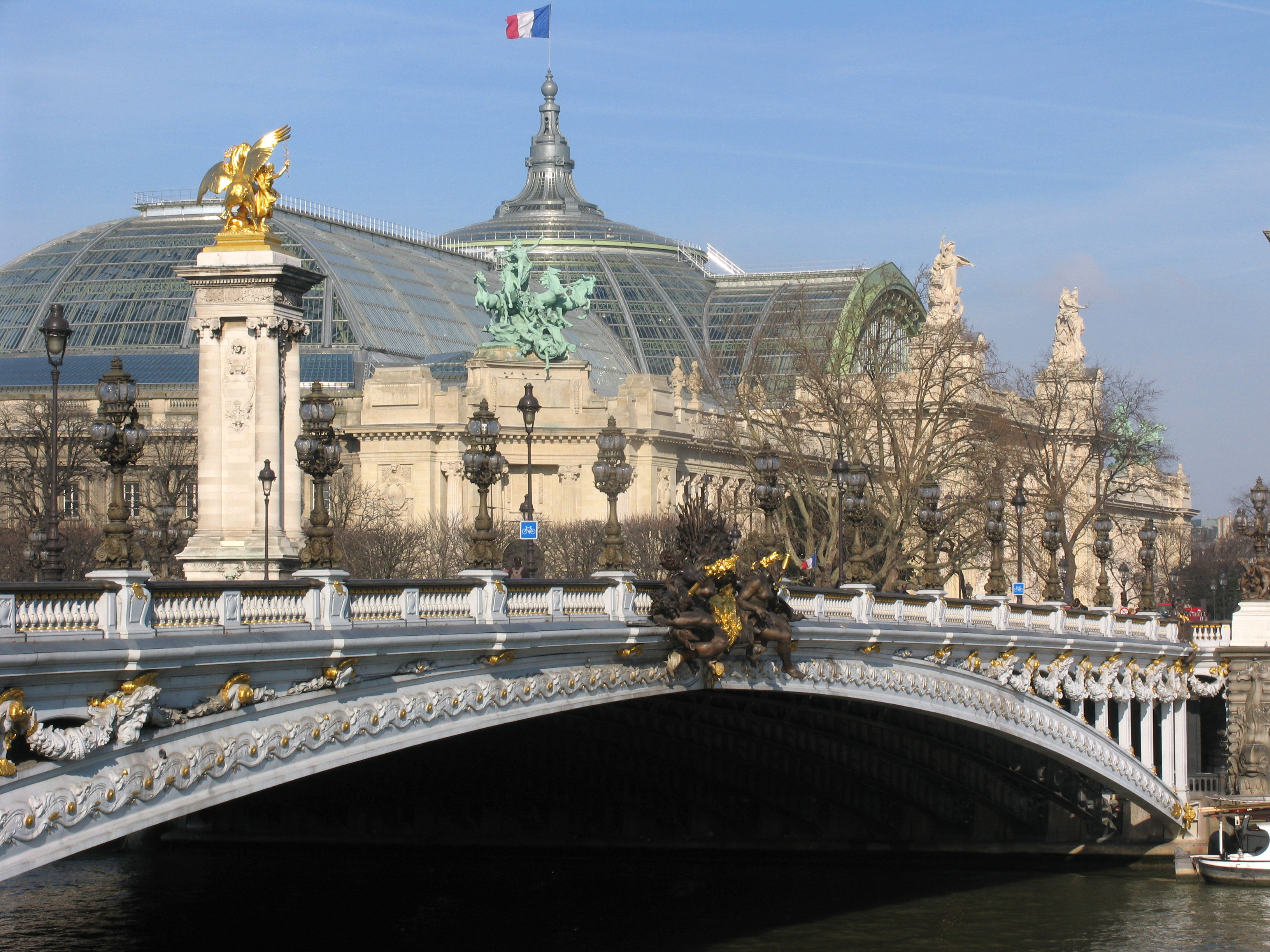 Grand Palais et Pont Alexandre III, Paris, France